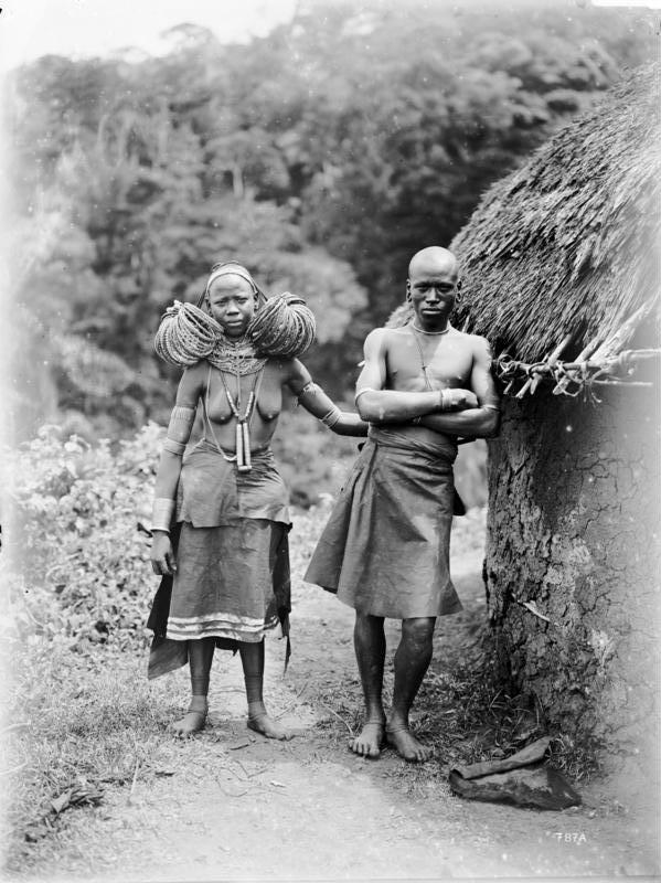 Waschambaapaar